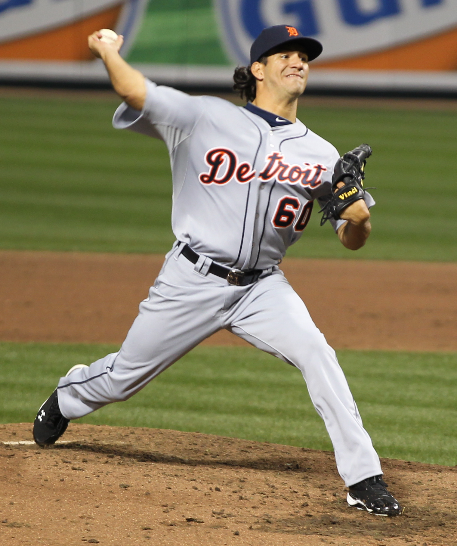 Brayan Villarreal